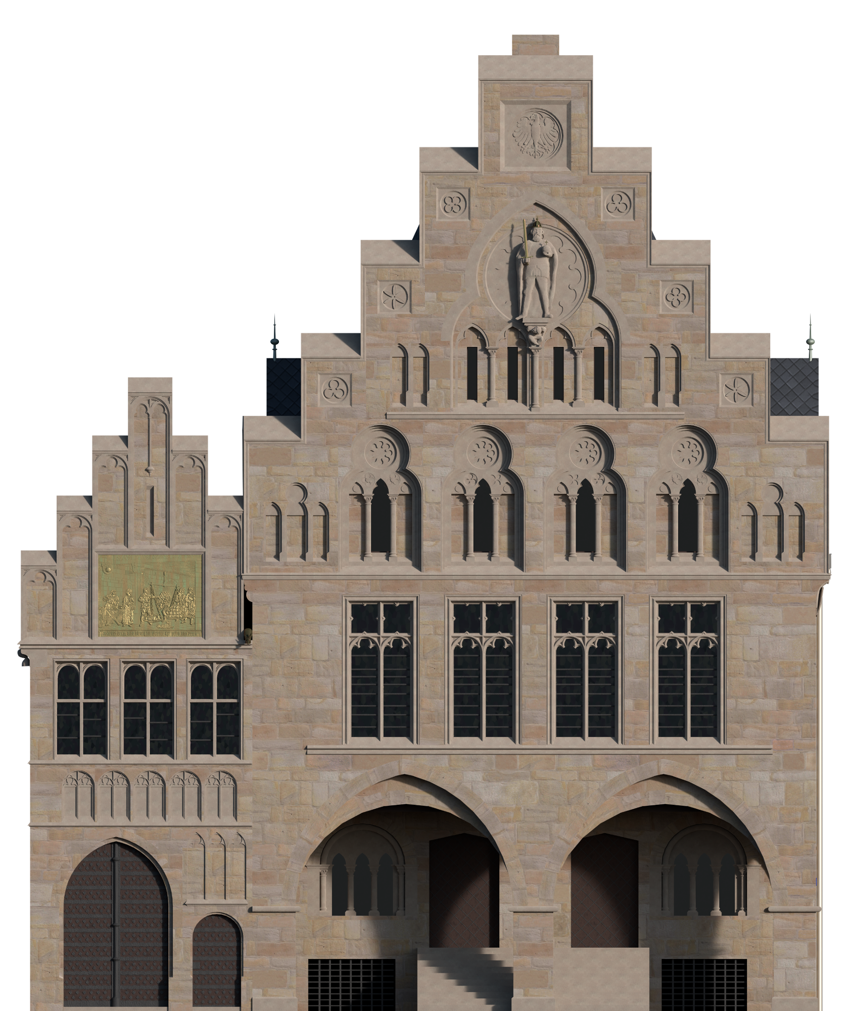 Ansicht des Nordgiebels (Marktseite) des Rathauses in Dortmund nach dem Umbau von 1897-99.